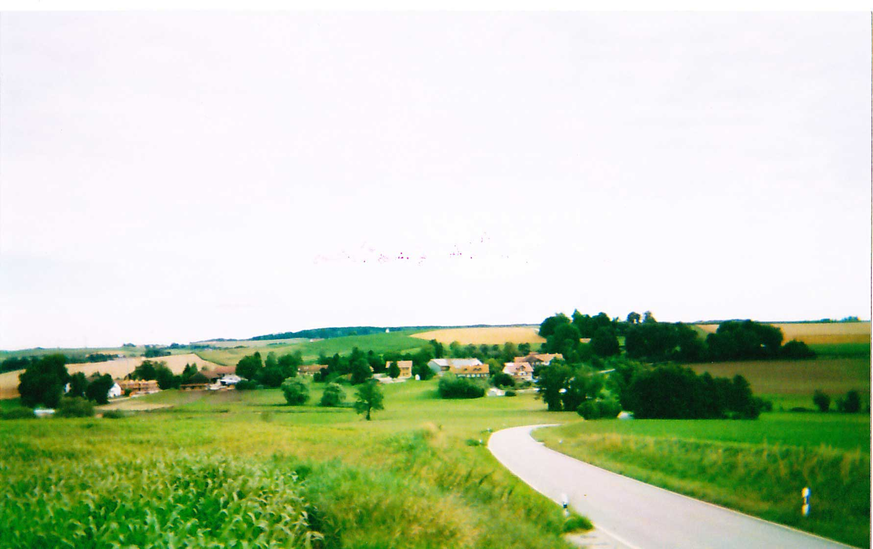 Wölling von Süden